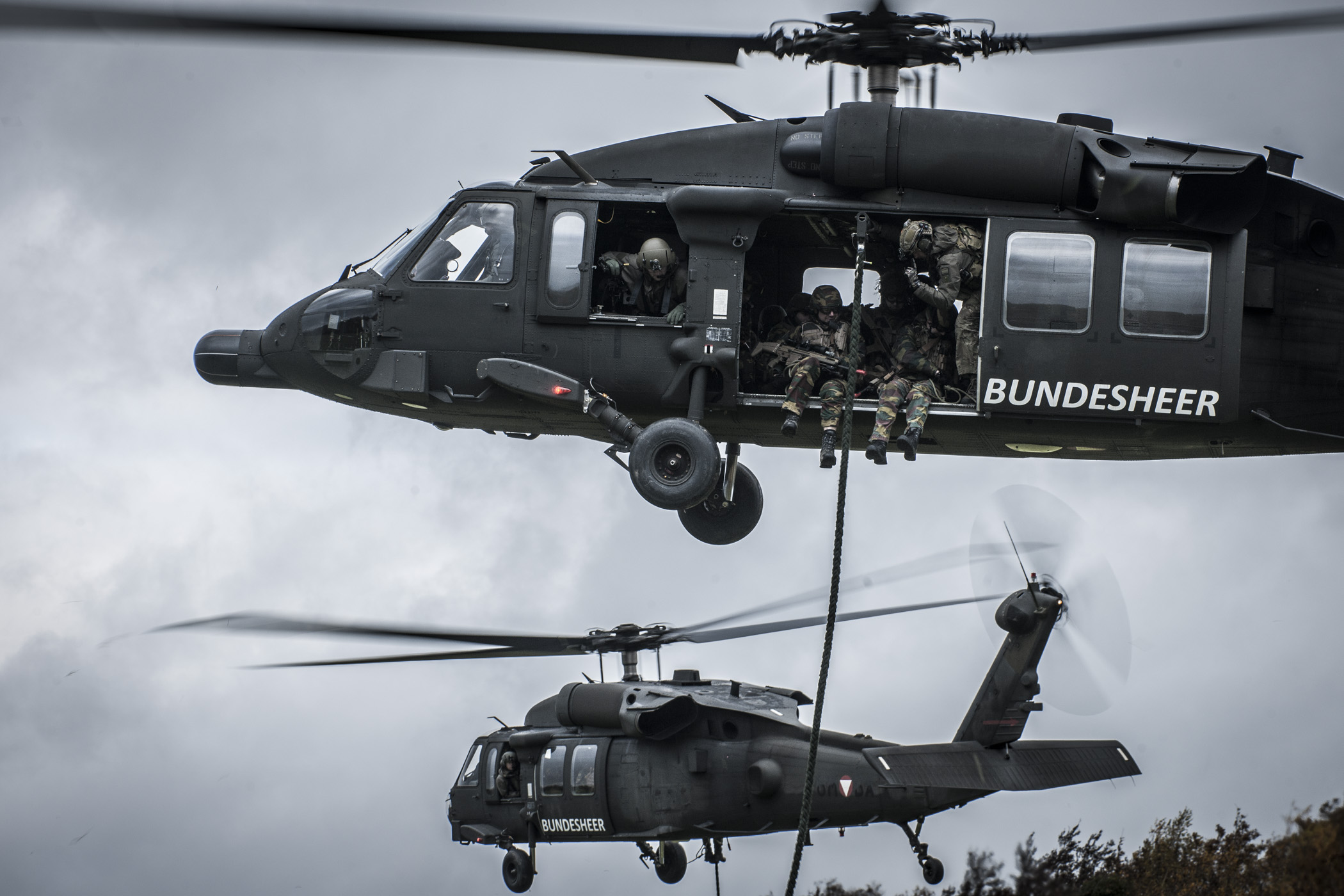 Zwei österreichische "Black Hawk" trainieren in Belgien.